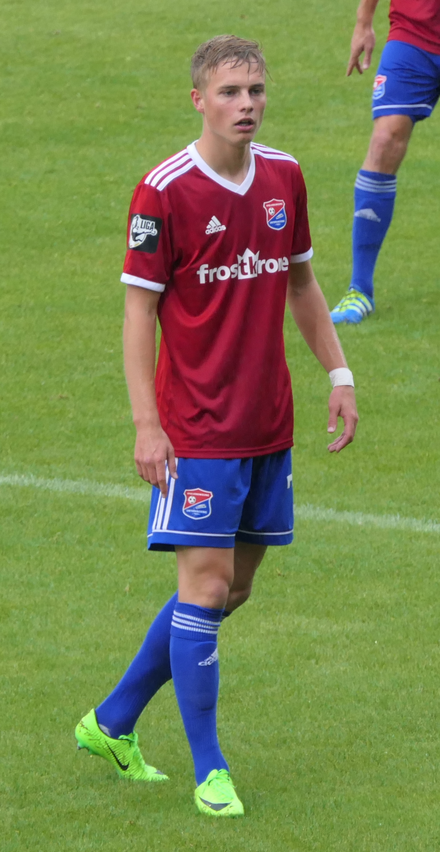 Der Fussballprofi Finn Porath im Trikot der SpVgg Unterhaching beim Heimspiel gegen Eintracht Braunschweig am 01.09.2018.